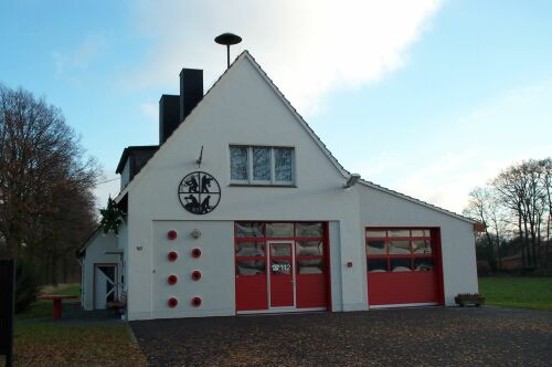 Das Bild zeit das Feuerwehr-Gerätehaus der Freiwilligen Feuerwehr Rebbeke